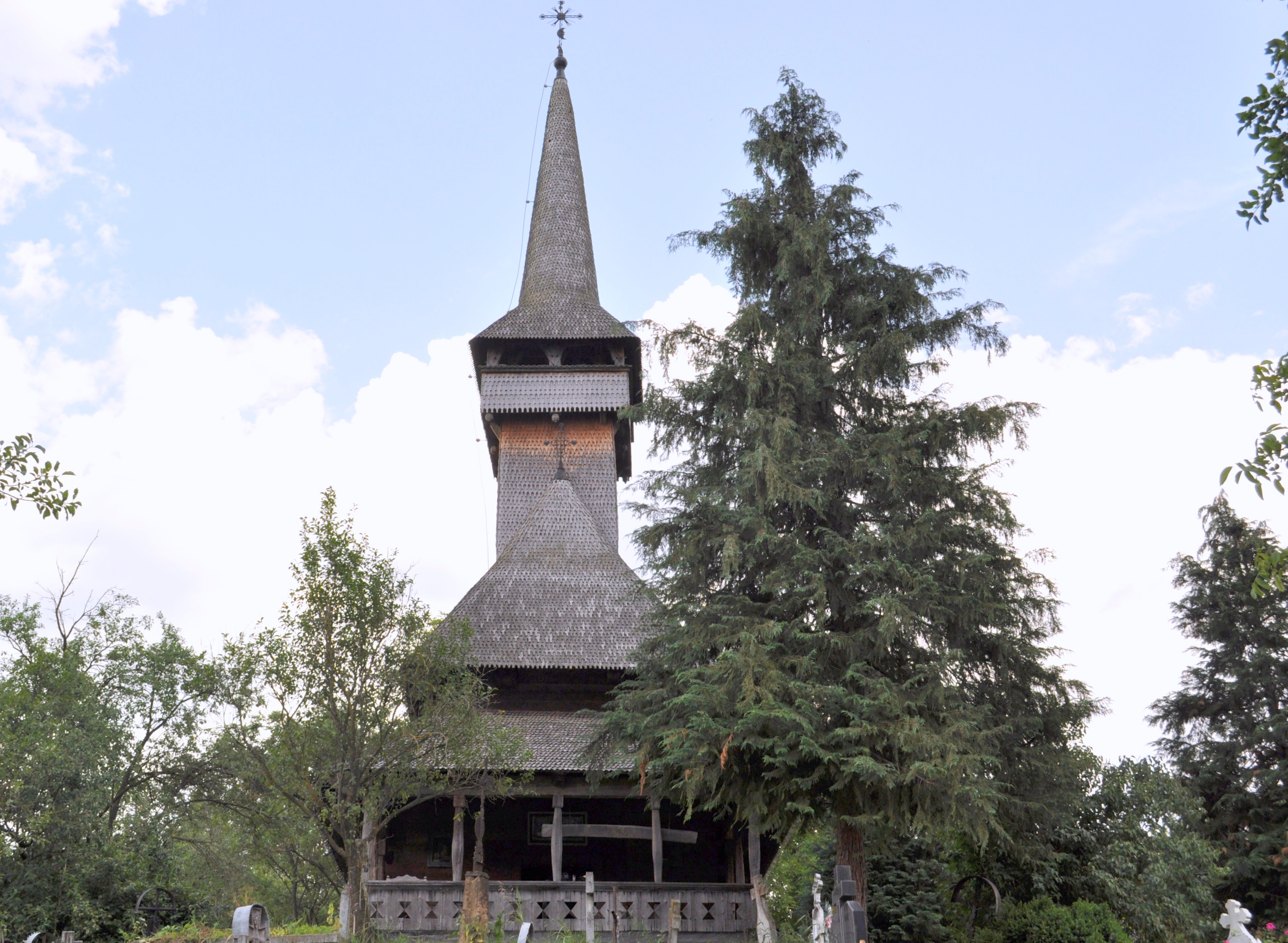 Biserica de lemn "Cuvioasa Paraschiva" , sat POIENILE IZEI